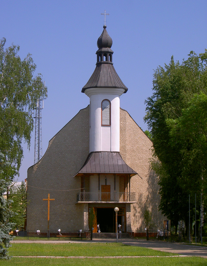 Aleksandrów - rzymskokatolicki kościół parafialny p.w. Matki Bożej Nieustającej Pomocy